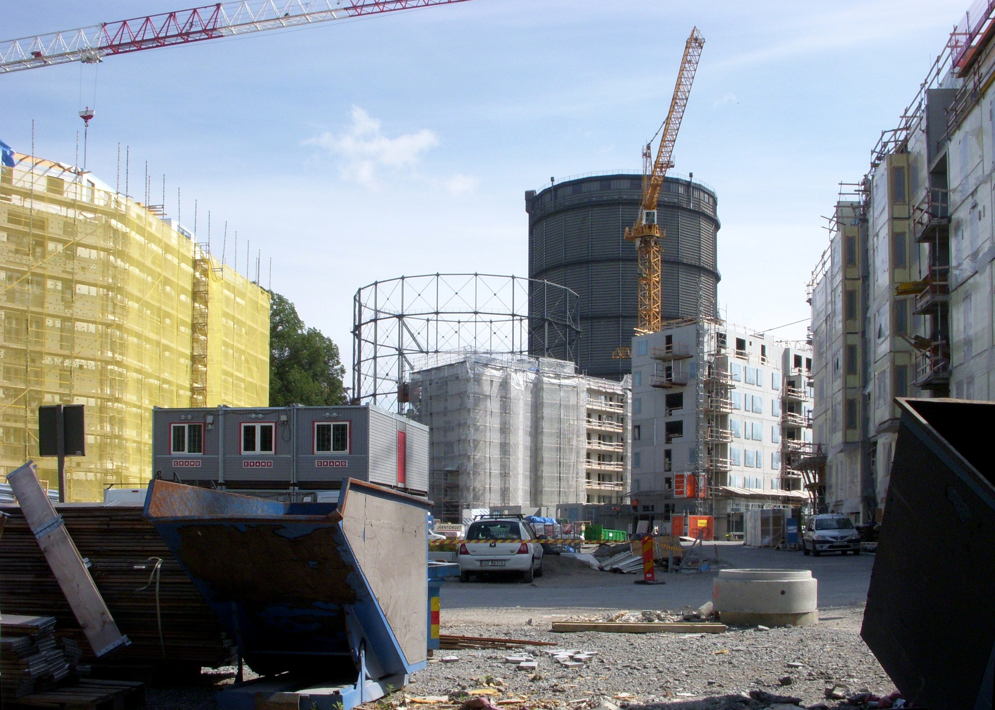 Byggarbetena för Norra Djurgårdsstaden närmast Husarviken i augusti 2012